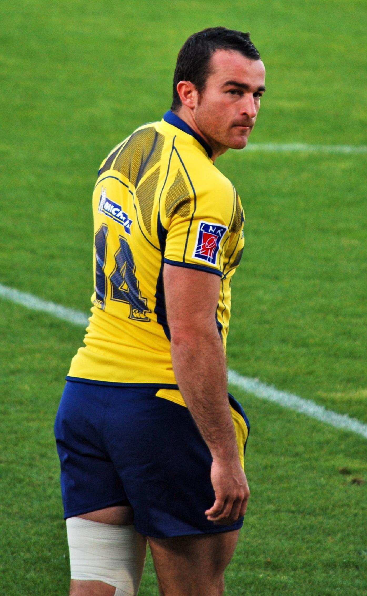 Benoît Baby lors de la demi-finale de top 14 2008-2009 opposant Clermont à Toulouse